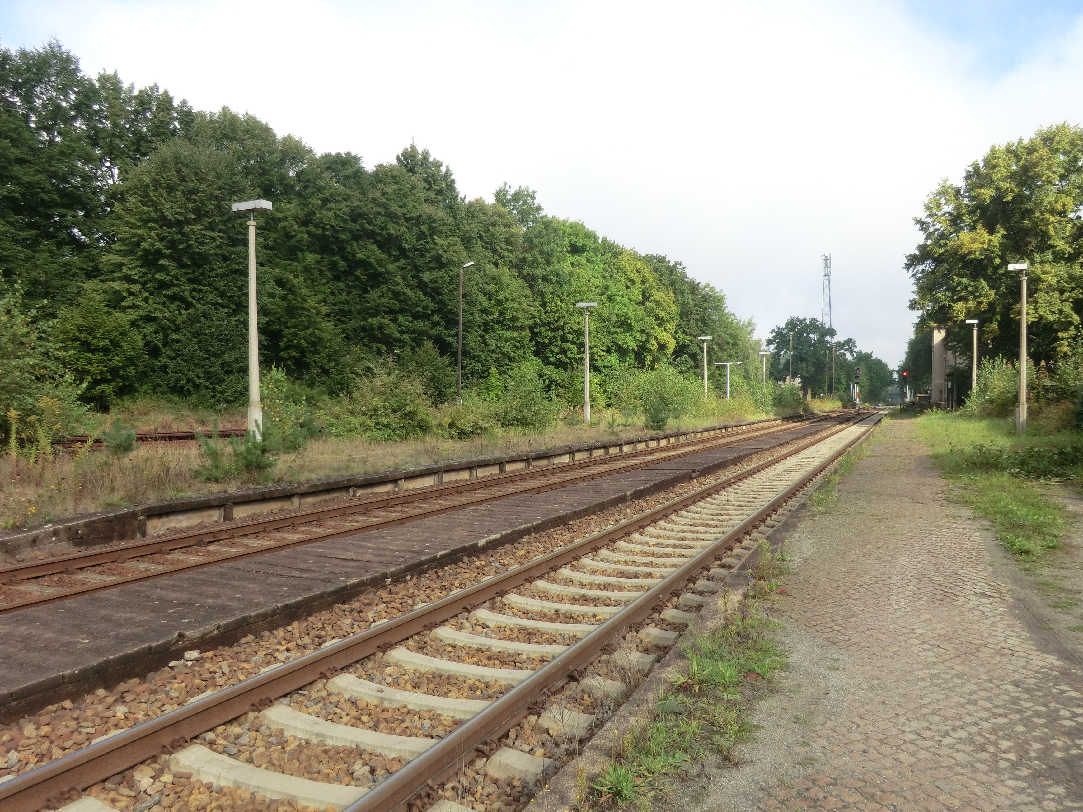 Bahnhofsgelände Straßgräbchen-Bernsdorf